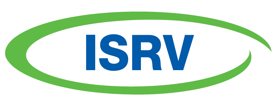 Logo des ISRV (Institut für Sozialmedizin, Rehabilitationswissenschaften und Versorgungsforschung) der Fachhochschule Nordhausen